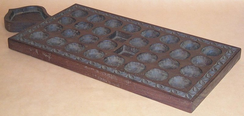 Bao board from Zanzibar